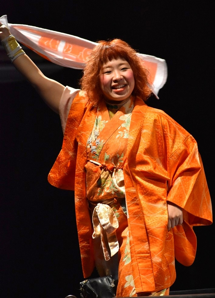 プロレスラーの米山香織選手